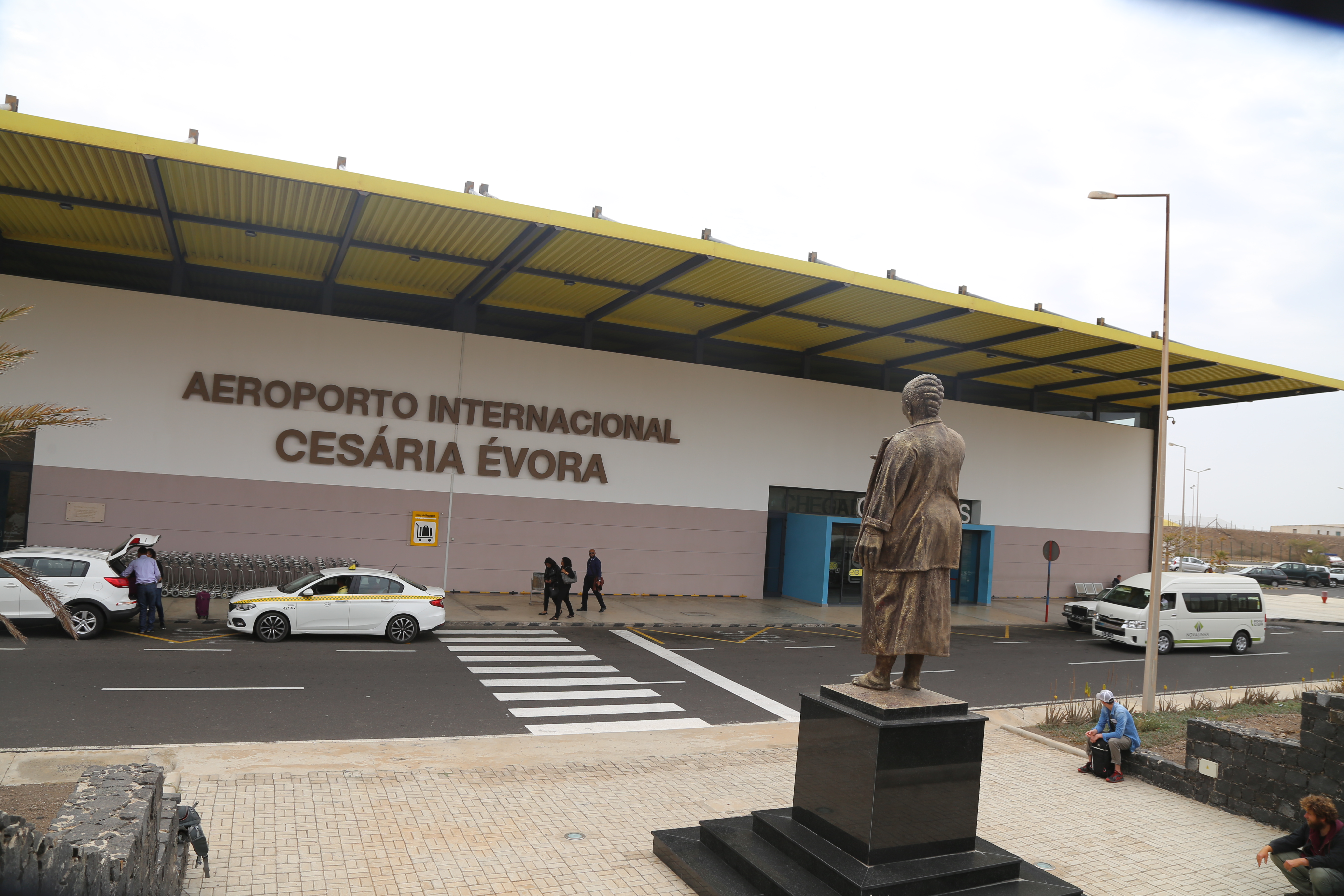 Statue af Cesária Évora foran lufthavnen af samme navn